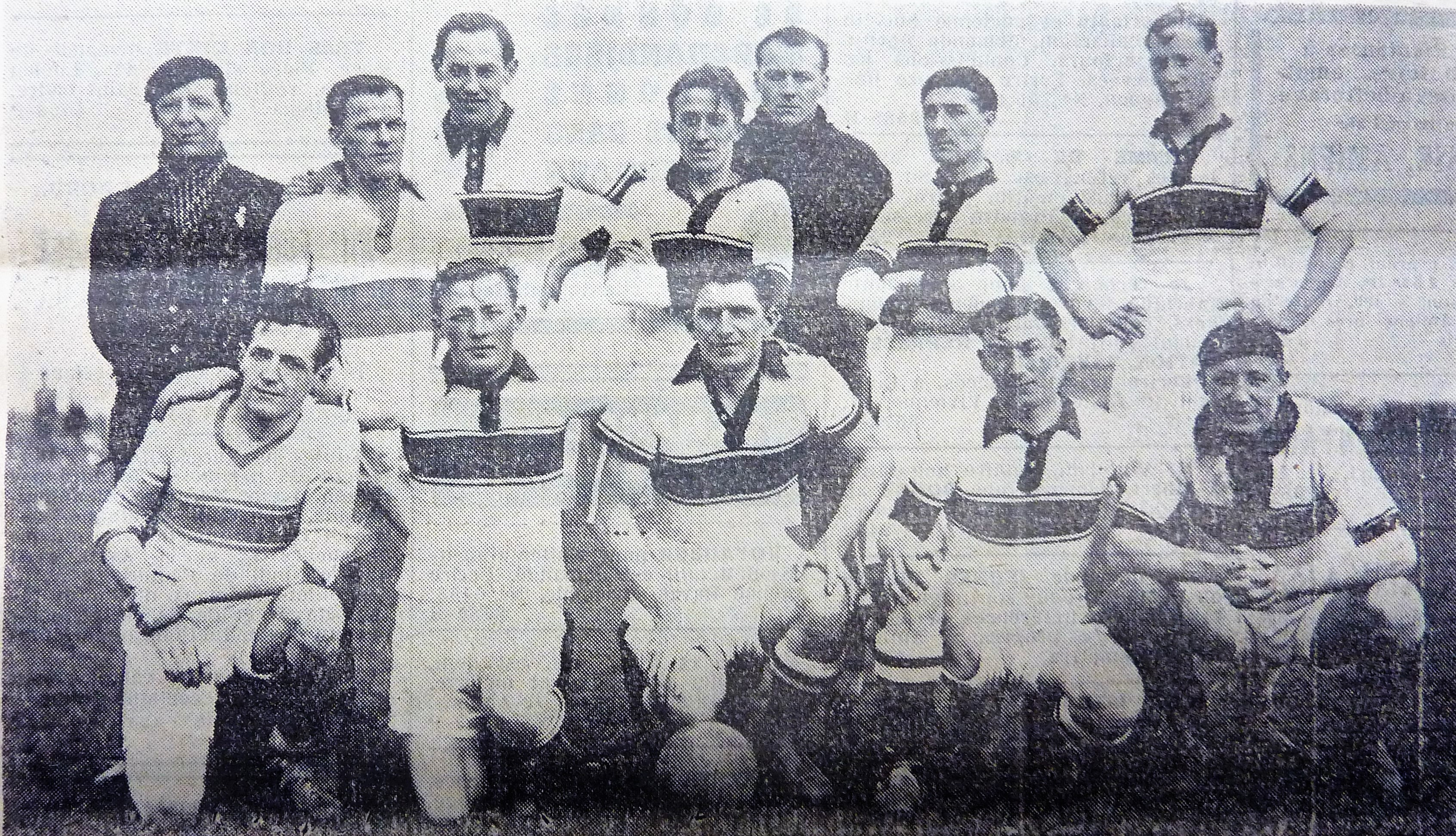 Stade amiénois en 1936. Debout : François, Ducrocq, Grandsert, Cayeux, Thédié, Chellé ; accroupis : Moirez, Nackaerts, Routier, Wallet, Viseur